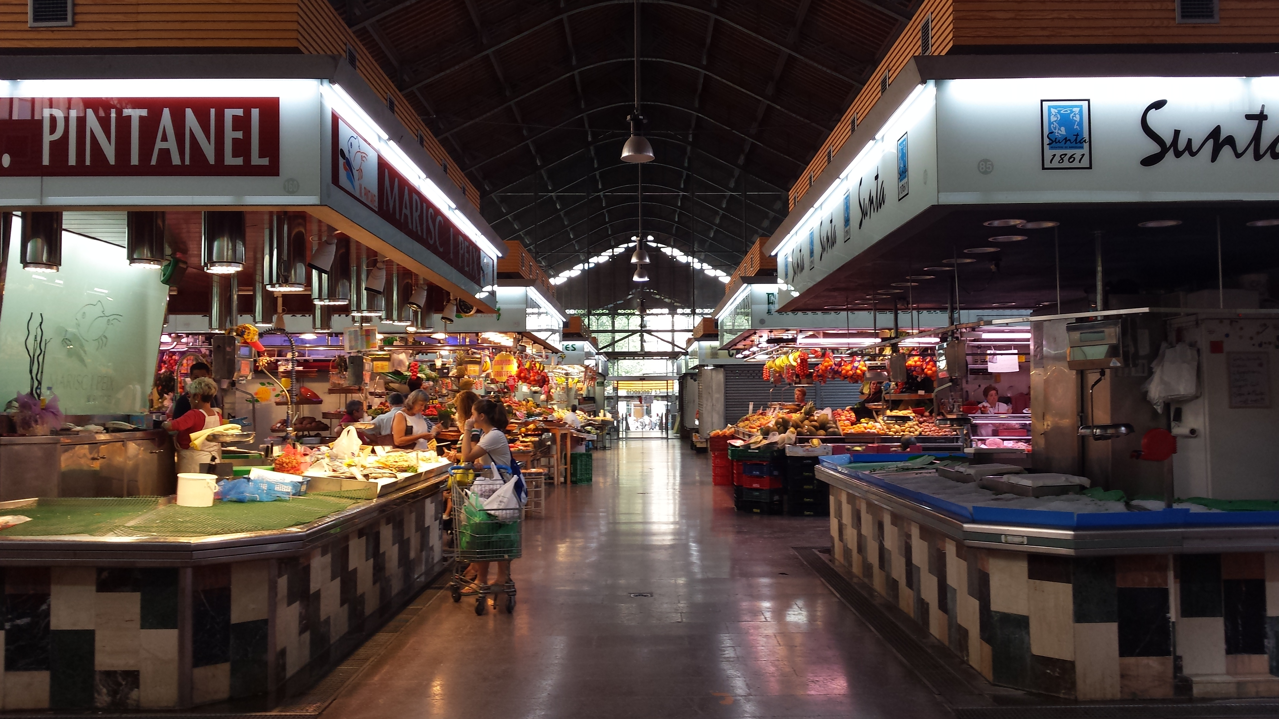 Interior del Mercat de la Concepció